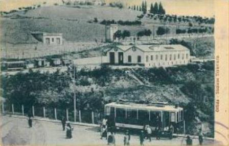 Tranvia di Offida - Cartolina d'epoca